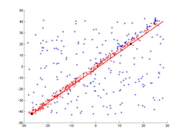 Modell ist zwar aus Inliener berechnet, liegt aber im zu grossem Abstand zu den anderen Inliener